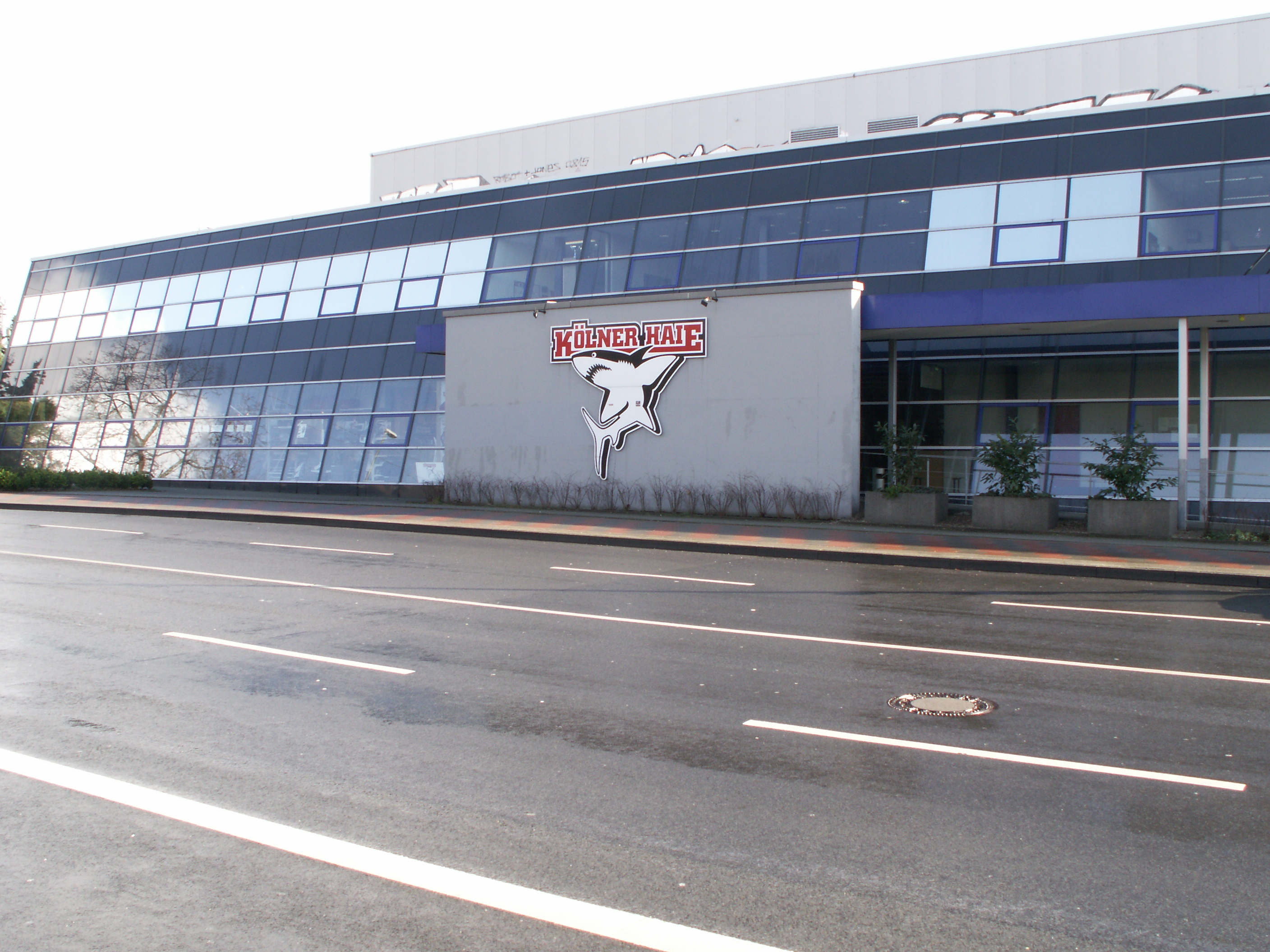 Kölnarena 2